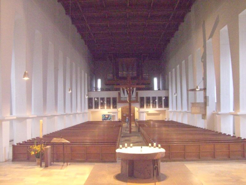 Hauptschiff St. Josef Memmingen 1929